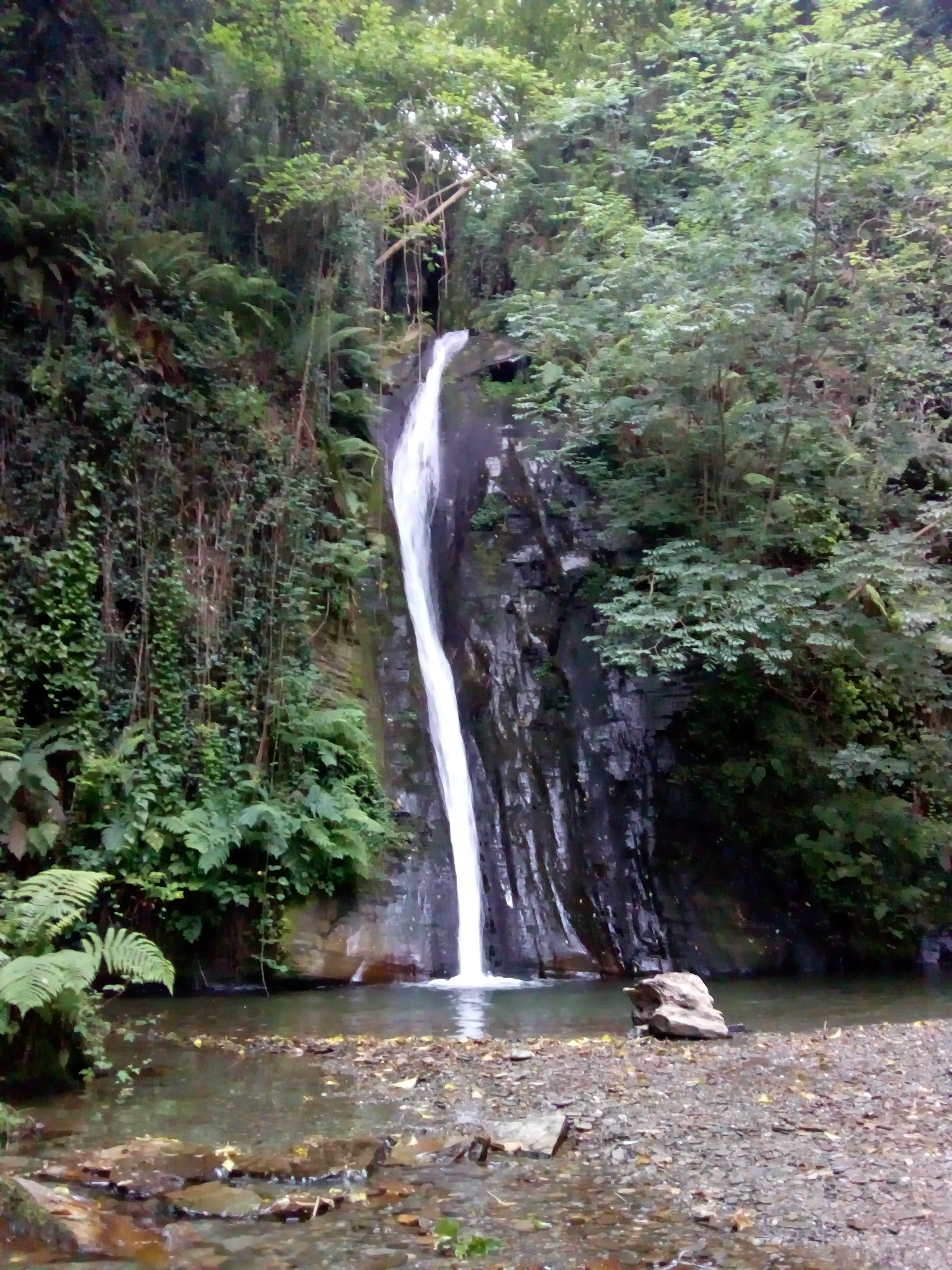 Salto do Coro